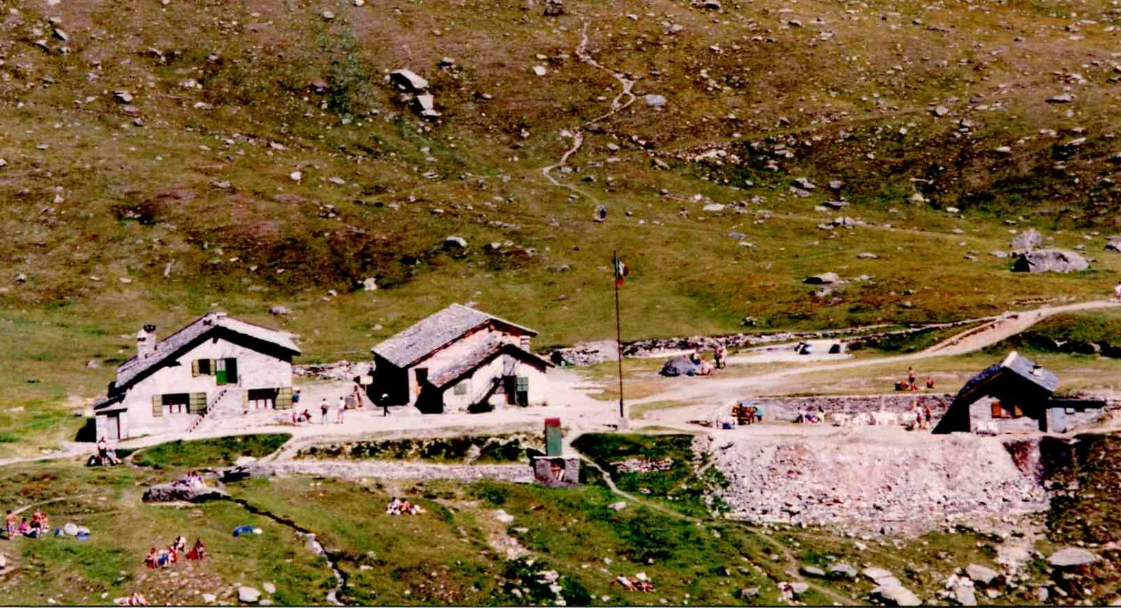 Il rifugio Vittorio Sella - Alpi Graie - Italia (Italy)